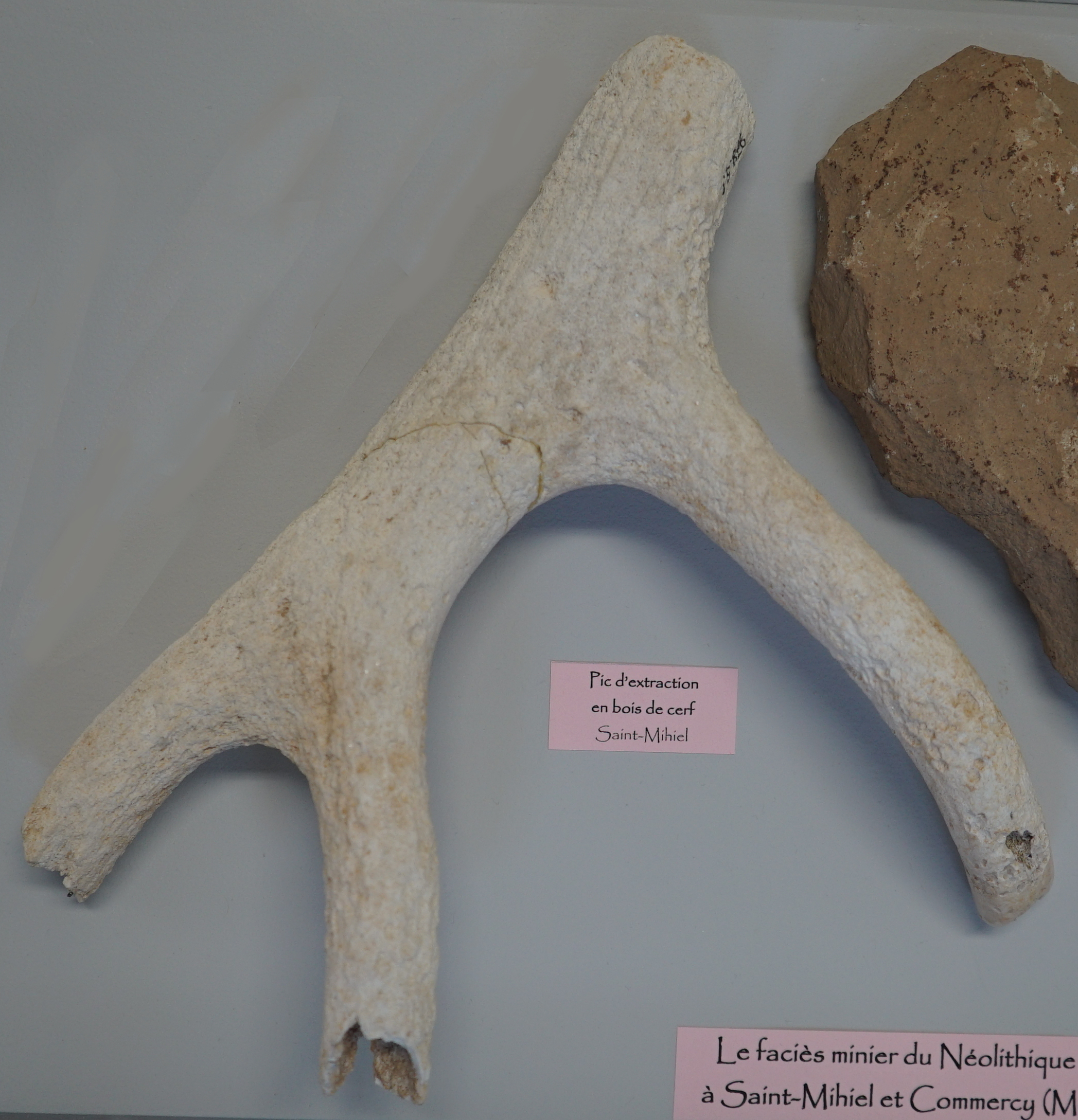 présenté au musée de Toul.